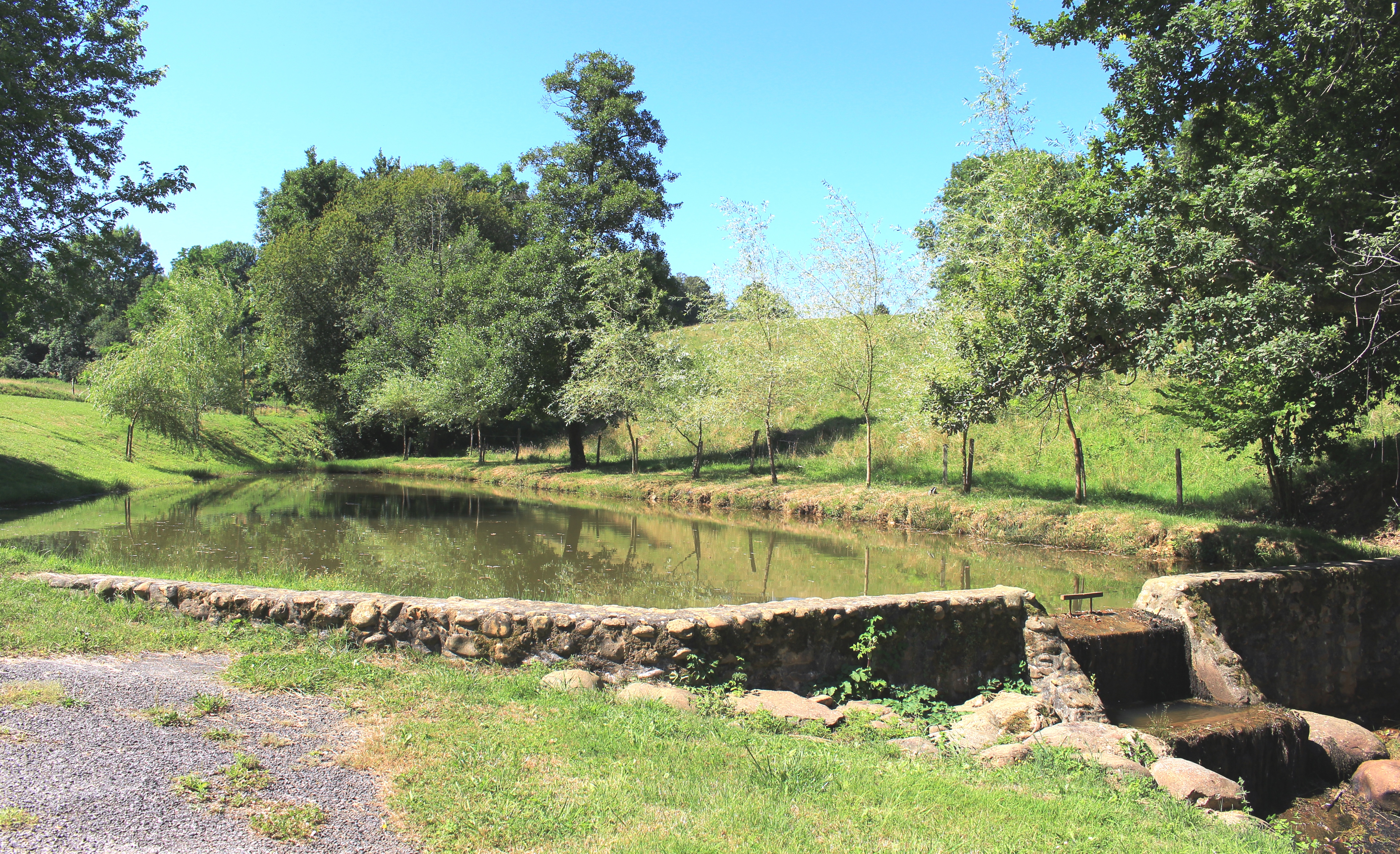 Bégole (Hautes-Pyrénées)